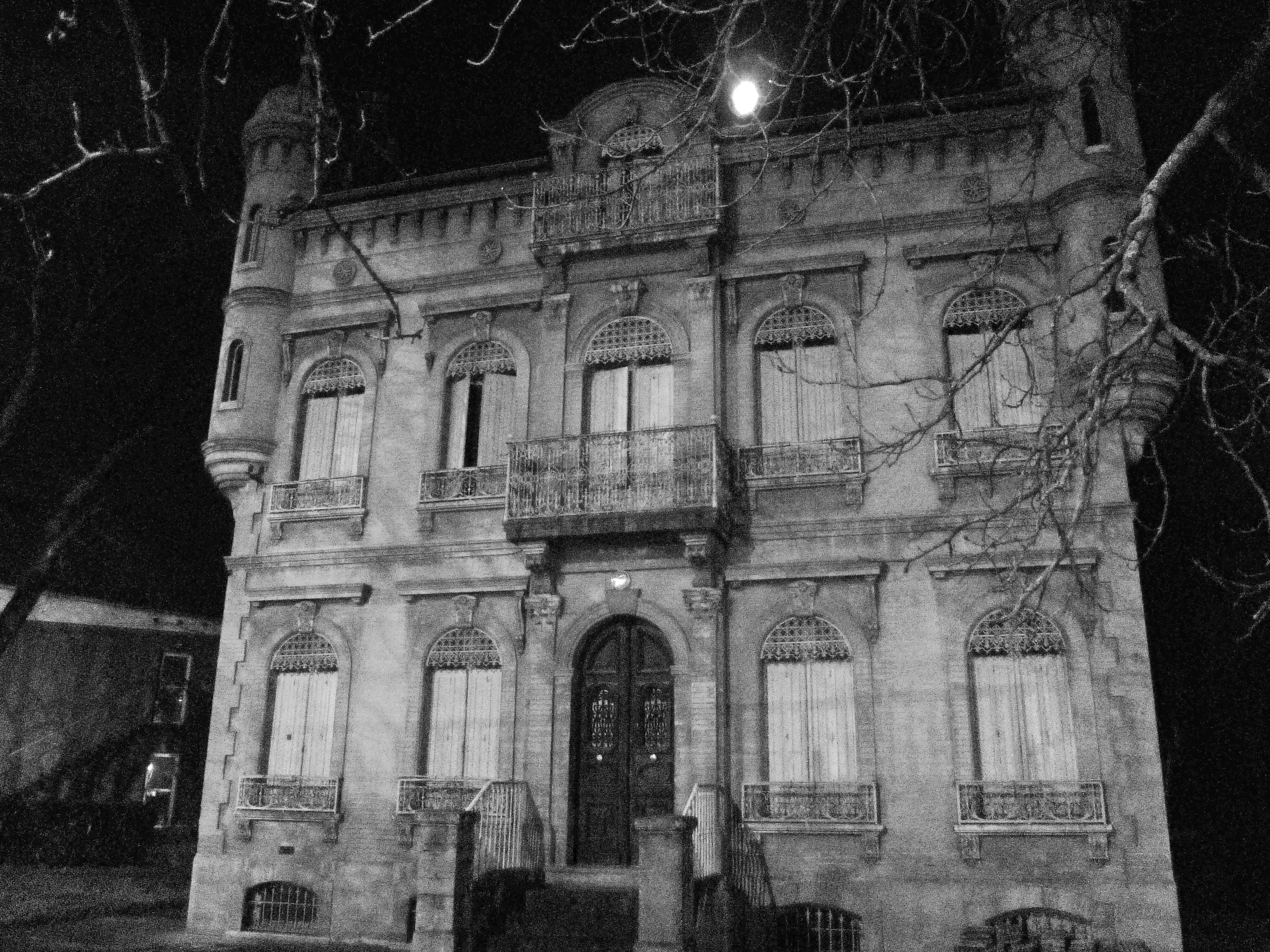 Toulouse (Haute-Garonne, France) : Le château des Vitarelles, un ancien hôtel particulier, maintenant inhabité et faisant partie d'une maison de retraite.